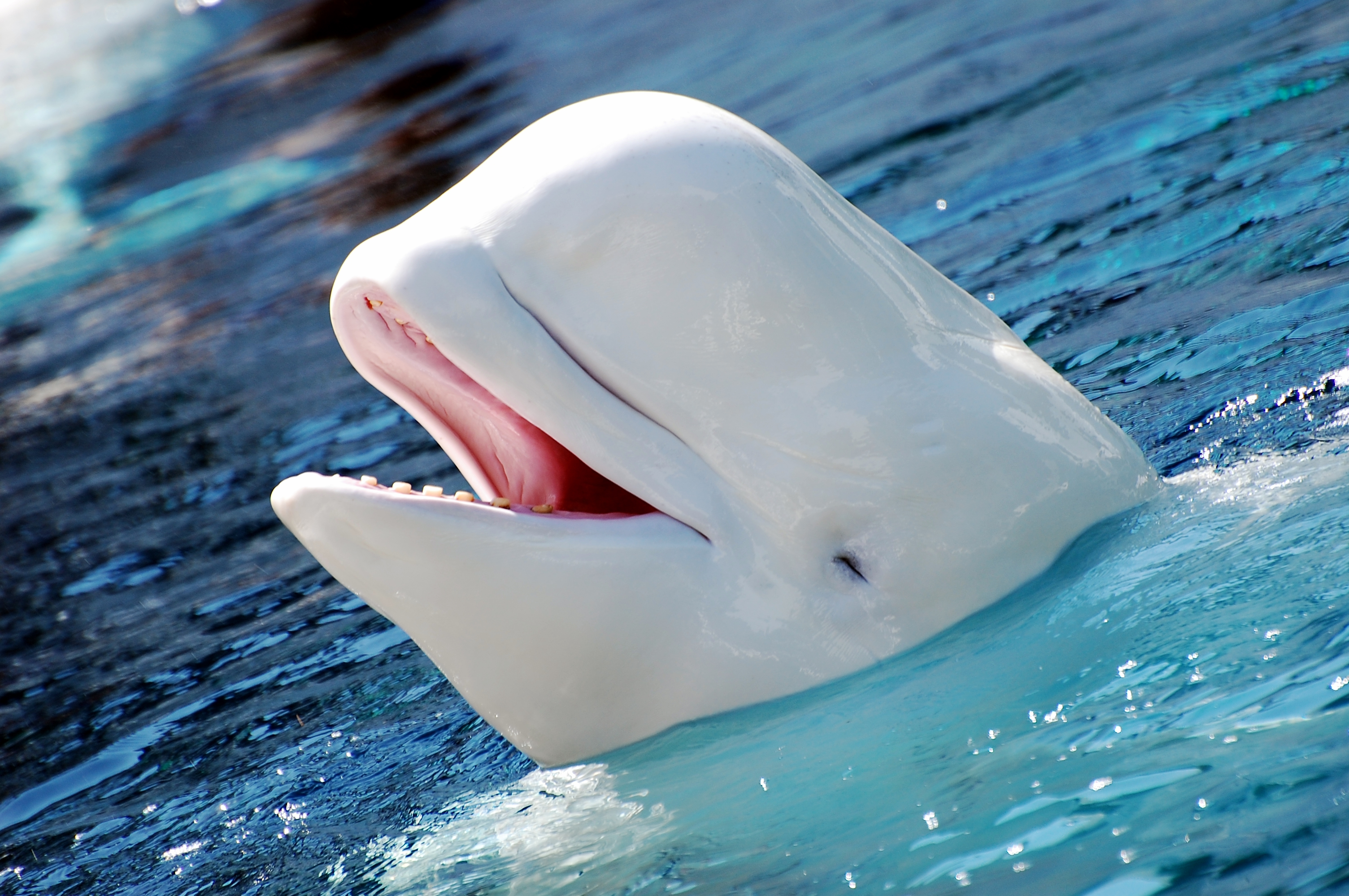 Beluga (Delphinapterus leucas)